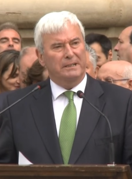 Gustavo Alcalde